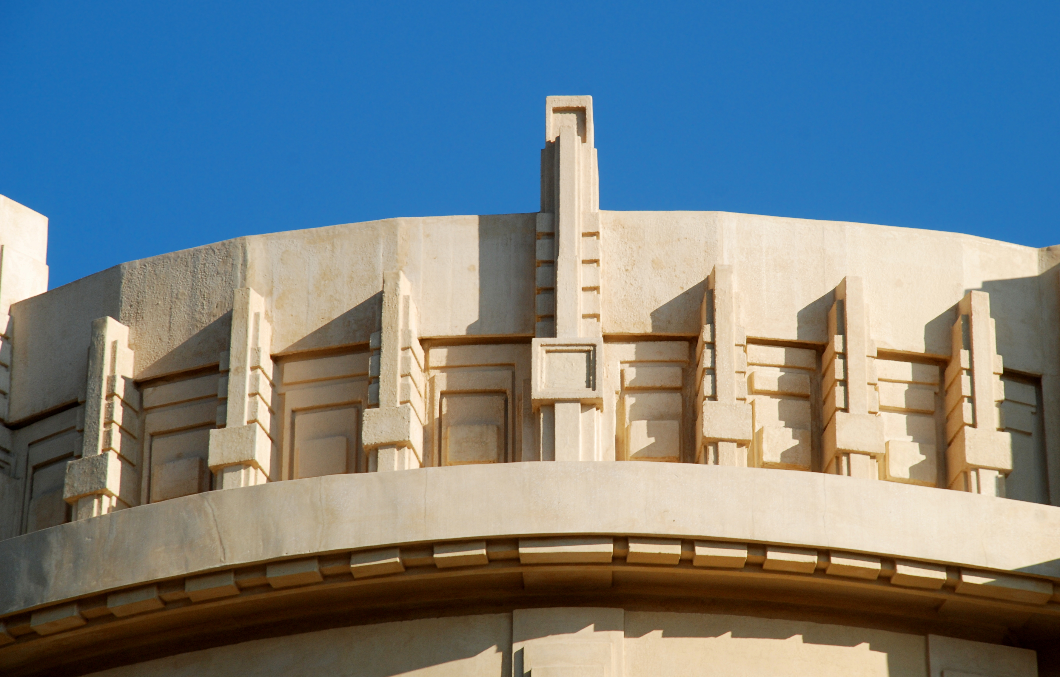 Belgique - Bruxelles - Uccle - Hôtel Haerens (Art déco - Antoine Courtens - 1928)